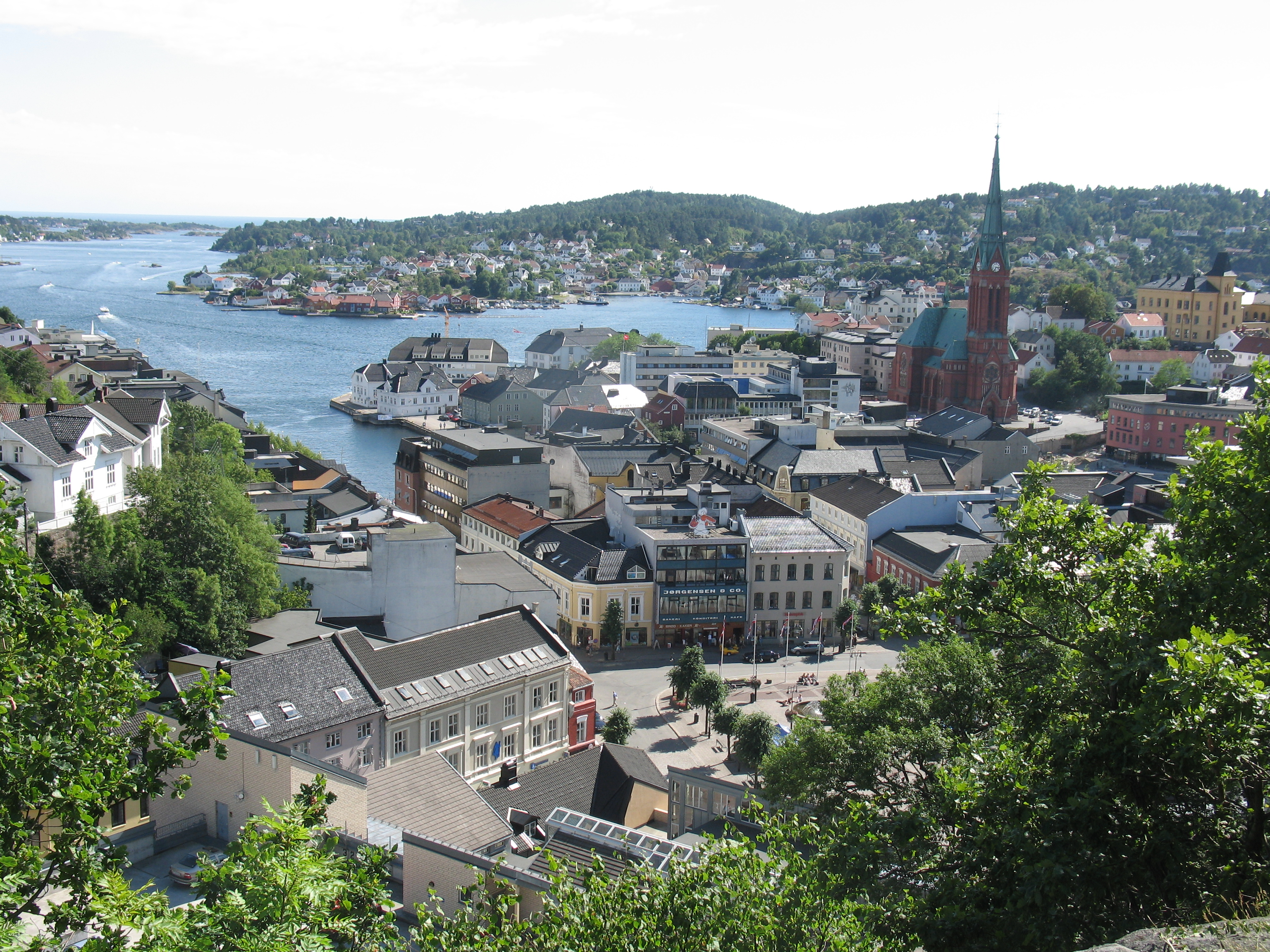 Utsikt over Arendal sentrum. Pollen og Torvet midt i bildet. Trefoldighetskirken og Tyholmen til høyre. I bakgrunnen Galtesund til venstre, Hisøy og Kolbjørnsvik til høyre.